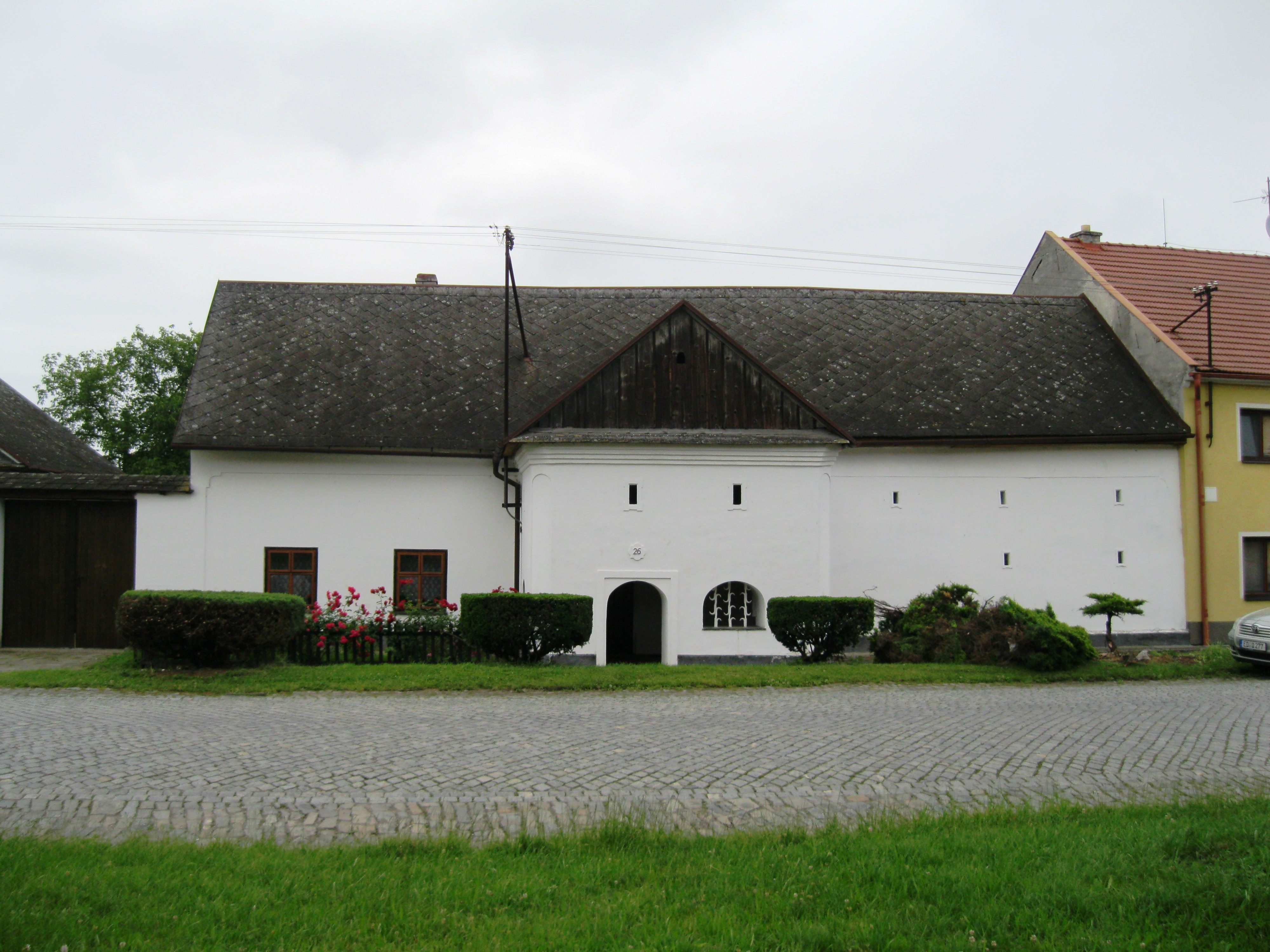 Venkovská usedlost (Příkazy), náves 26, Příkazy